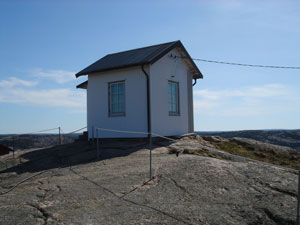 Pilot hut, Hällsö, Sweden